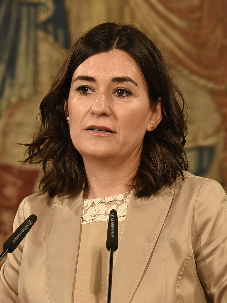 Toledo, 25 de julio de 2018.- El presidente de Castilla-La Mancha, Emiliano García-Page, se reúne con la ministra de Sanidad, Consumo y Bienestar Social, Carmen Montón. (Fotos: José Ramón Márquez // JCCM)